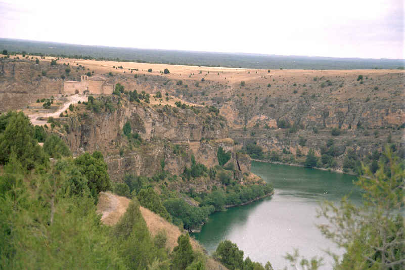 Hoces del río Duratón y la ermita de San Frutos. (Provincia de Segovia, España) Tomada por --JMSE el 2 de julio de 2003 y cedida a Wikipedia.